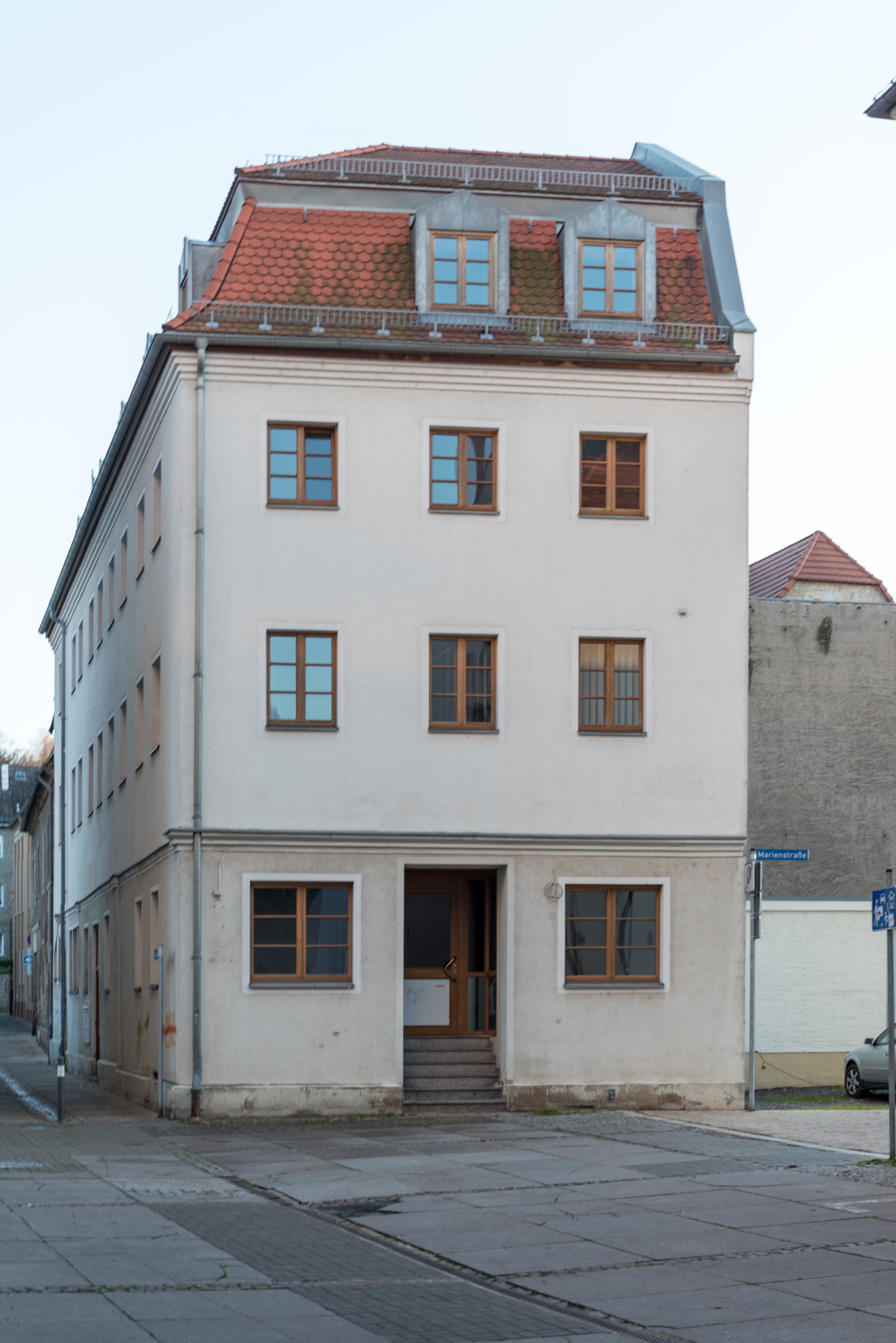 Weißenfels, Marienstraße 12